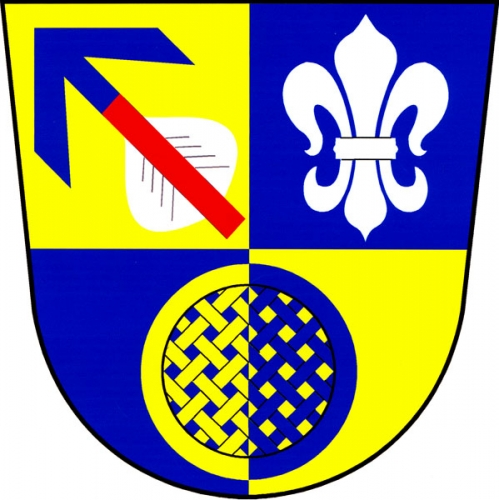 znak, Pracejovice, okres Strakonice